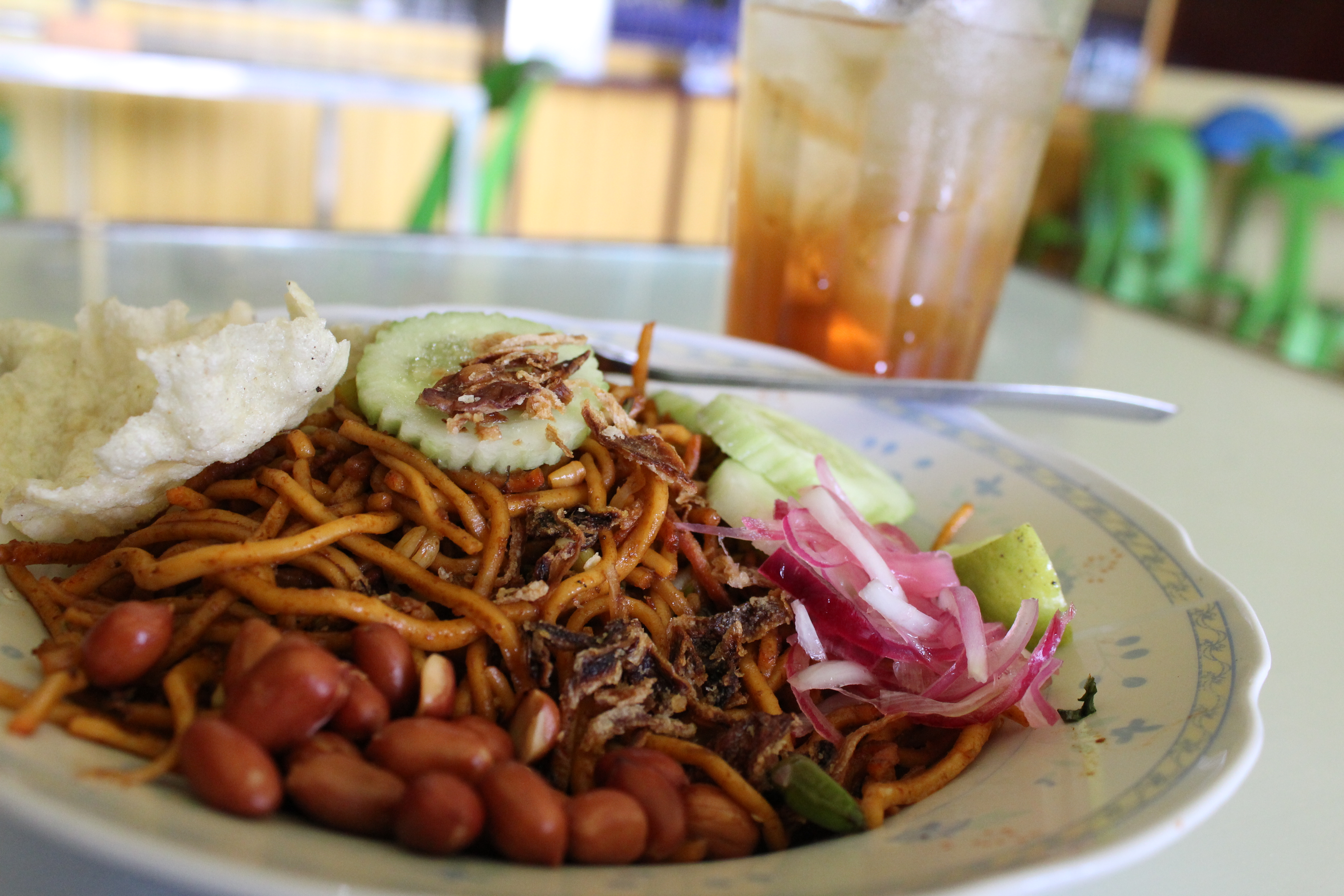 Mi Goreng Khas Aceh dengan taburan bawang, irisan mentimun, bawang acar, dan emping melinjo.